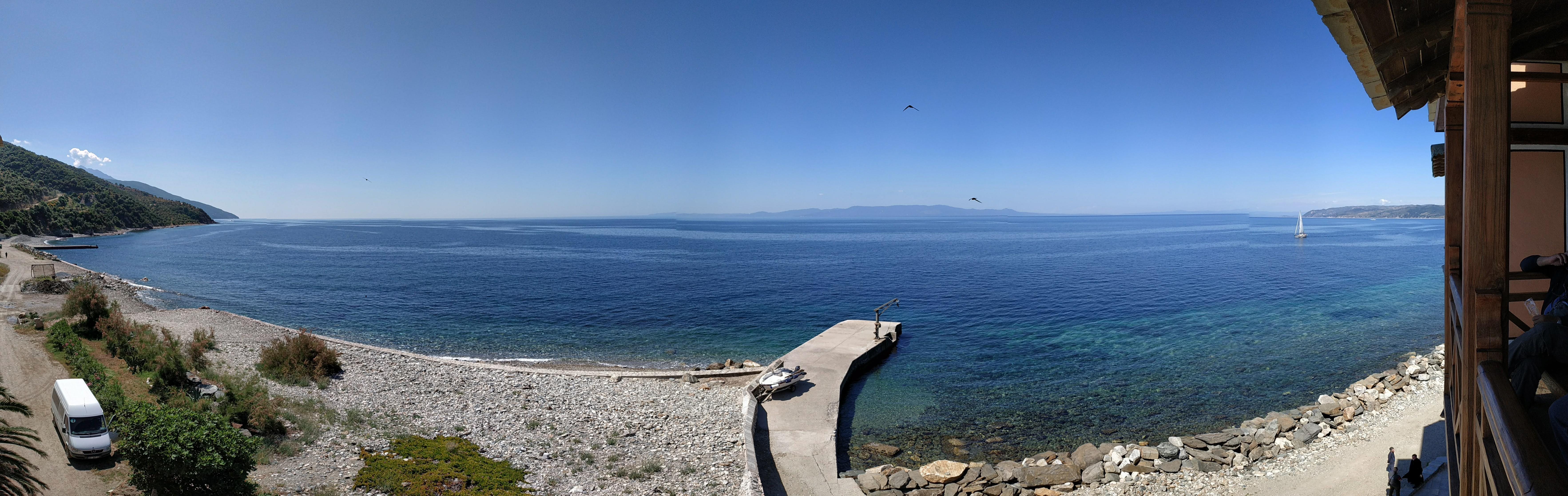 Панорама з берега острову Афон